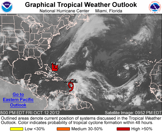 Imagen de satélite Atlántico Norte y mar Caribe del 12 de Octubre de 2012, mostrando las tormentas tropicales Patty y Rafael